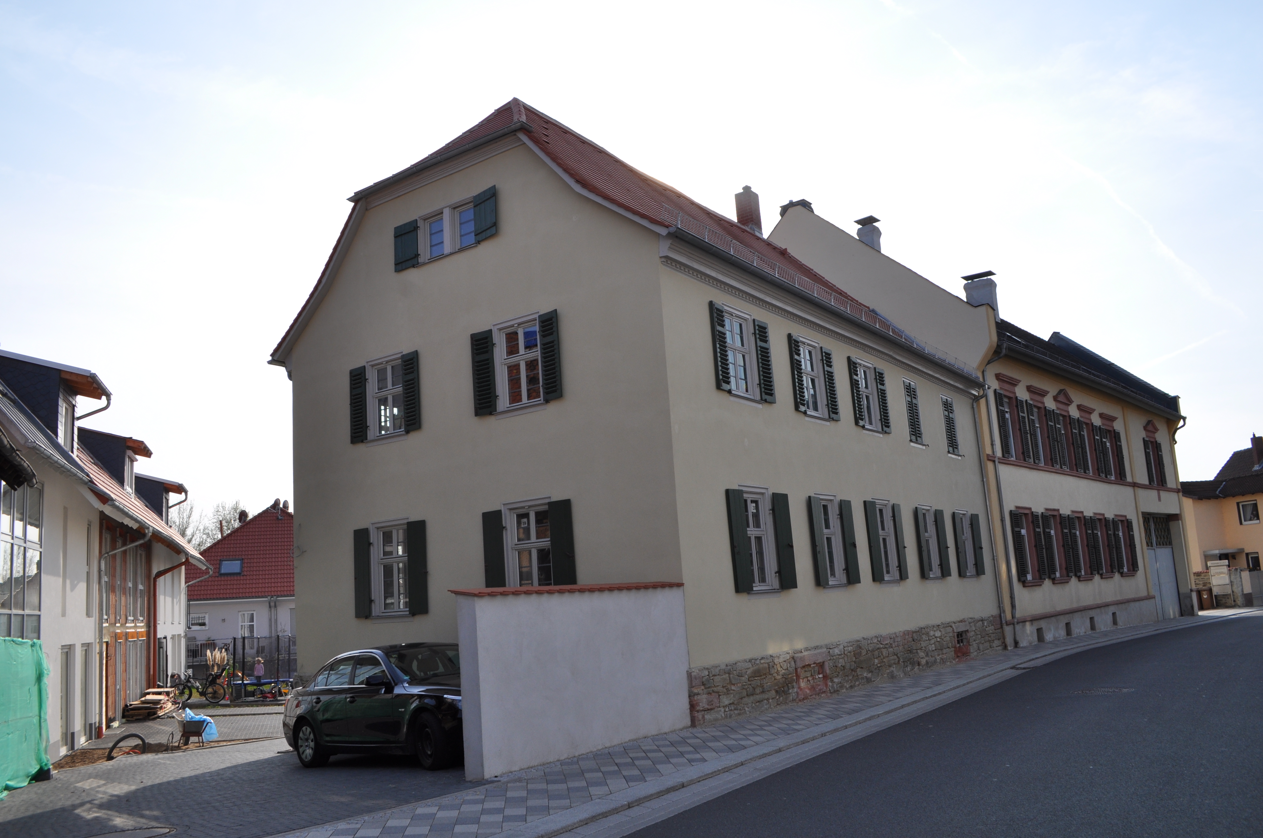 Sulzbach (Taunus), Hauptstraße 39